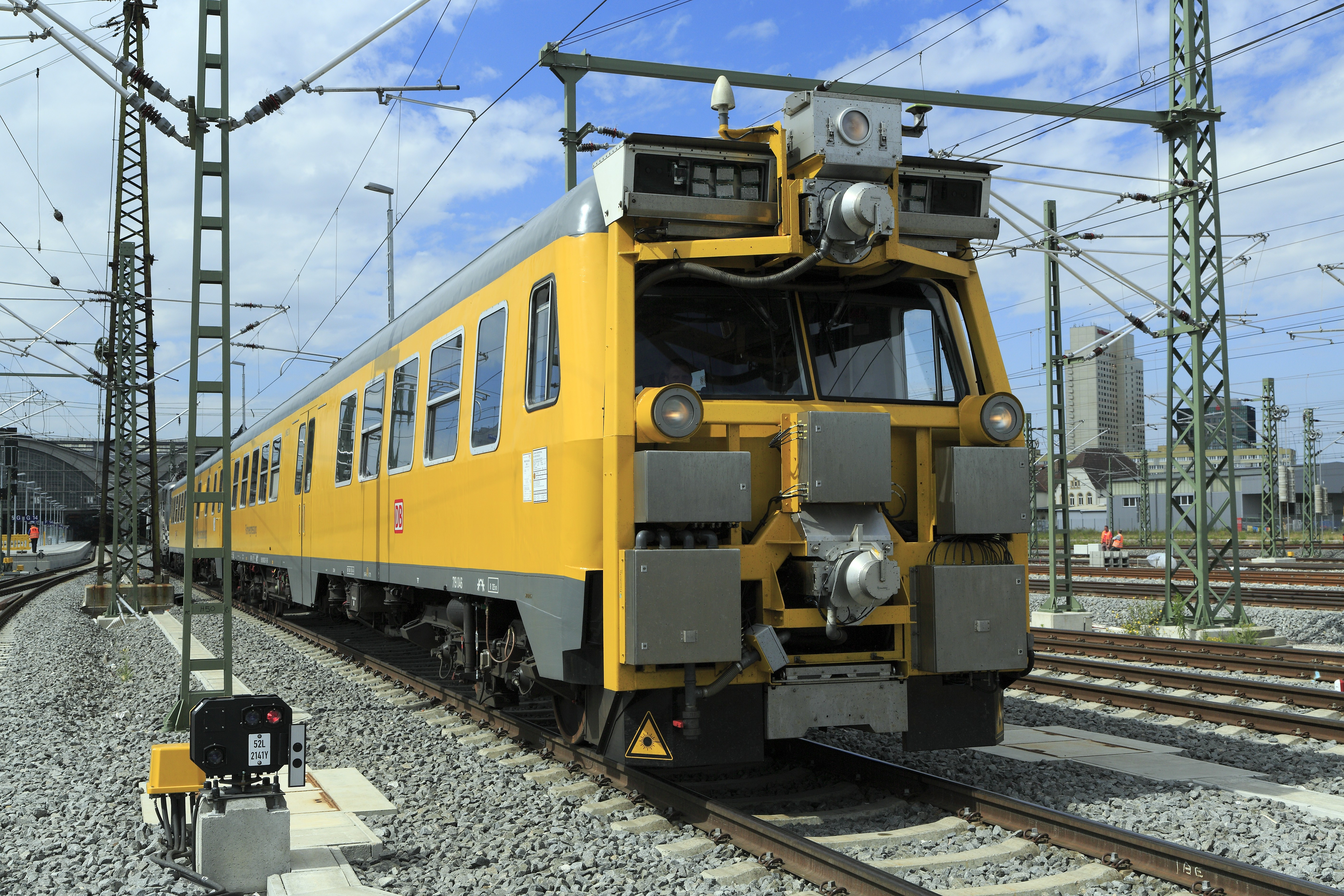 Der Wagen 719 046 trägt an der Stirnseite den Tragrahmen für die Messeinrichtungen, auch hilfsweises Kuppeln ist an dieser Seite nicht möglich. Messfahrten im Rahmen der Einbindung der Schnellfahrstrecke Erfurt–Halle/Leipzig in den Knoten Leipzig, Wendehalt auf dem Lokwartegleis 513 zwischen den Gleisen 13 und 14.